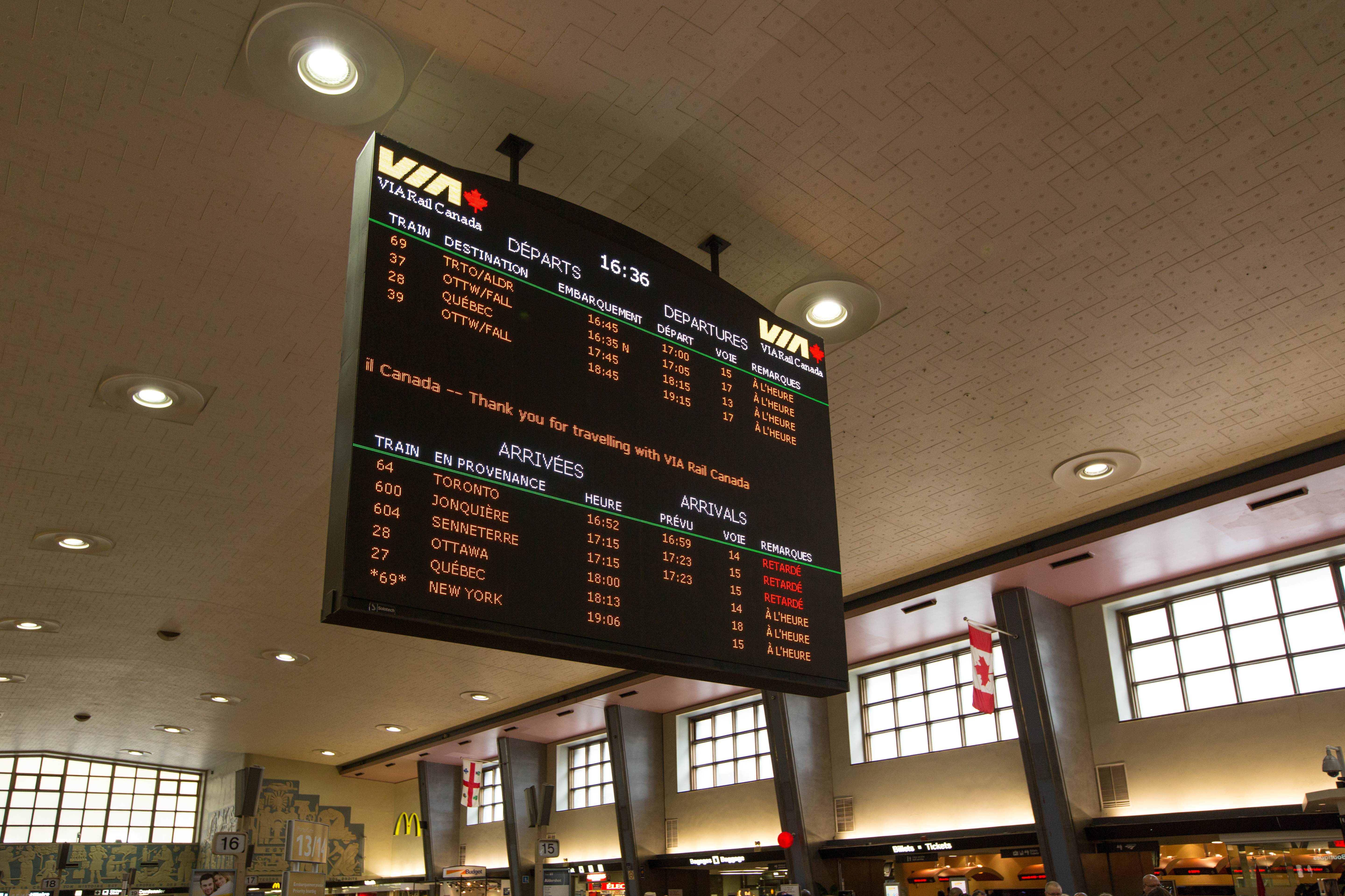 Gare Centrale Montreal - VIA Rail Canada